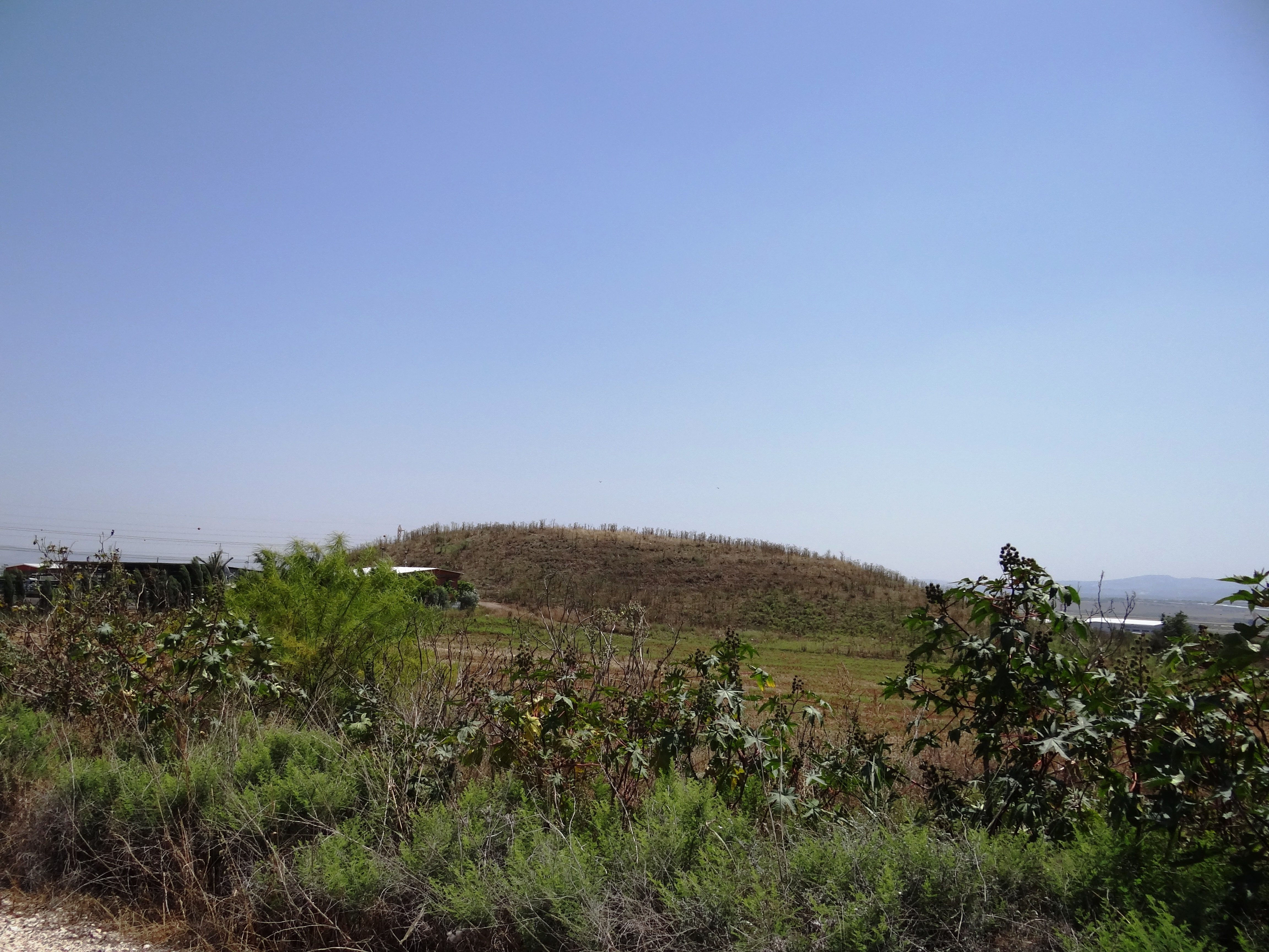 תל שדוד הקרוי גם תל שריד הינו תל קדום הממוקם בחלקו הצפוני של עמק יזרעאל, סמוך לקיבוץ שריד הנקרא על שמו. מבט מכיוון צפון